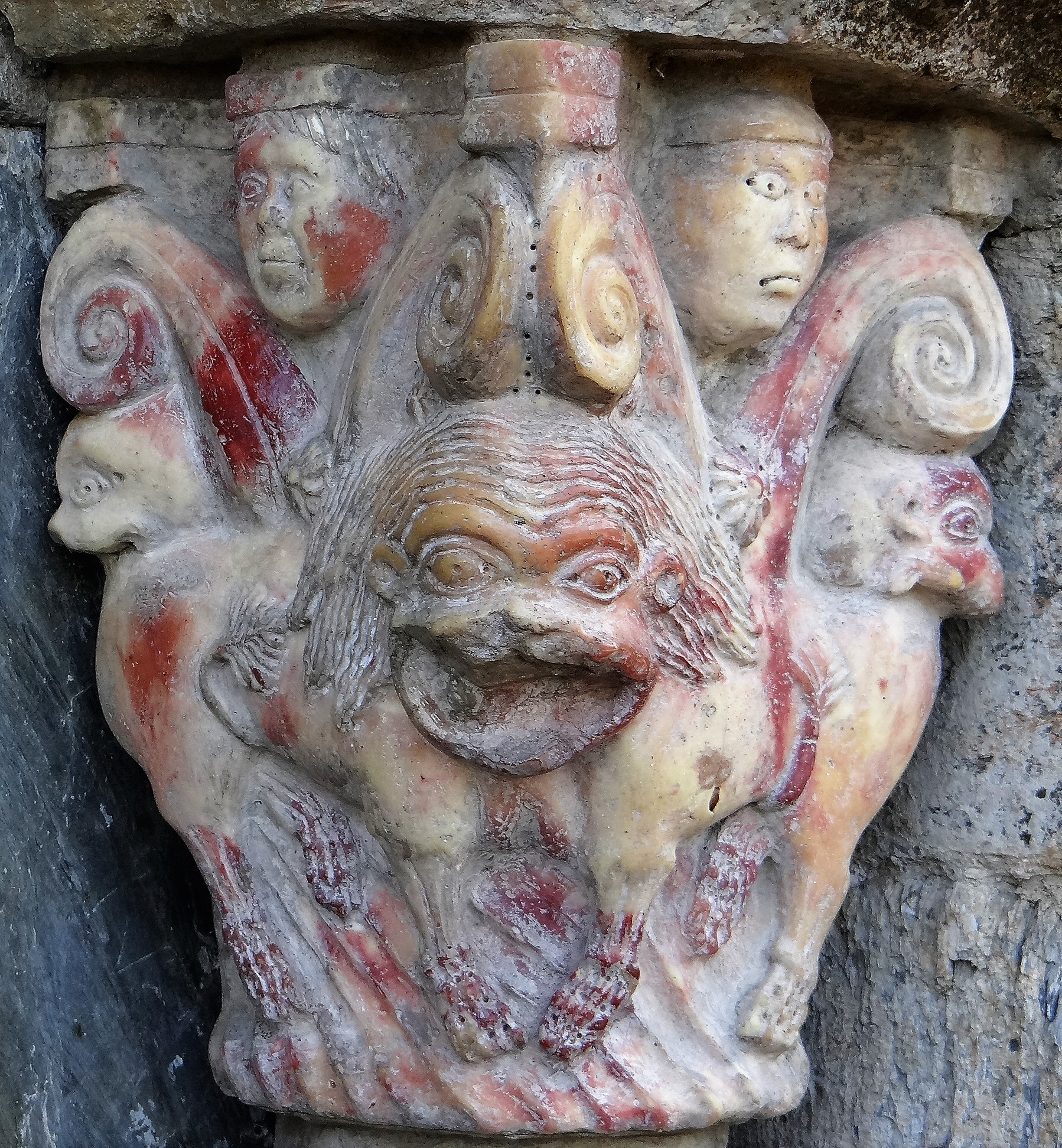 Prieuré de Serrabonne - Portail nord - Chapiteau à droite de l'entrée : Tête de lion gueule ouverte